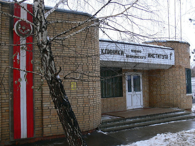 СамВМИ (клиники)